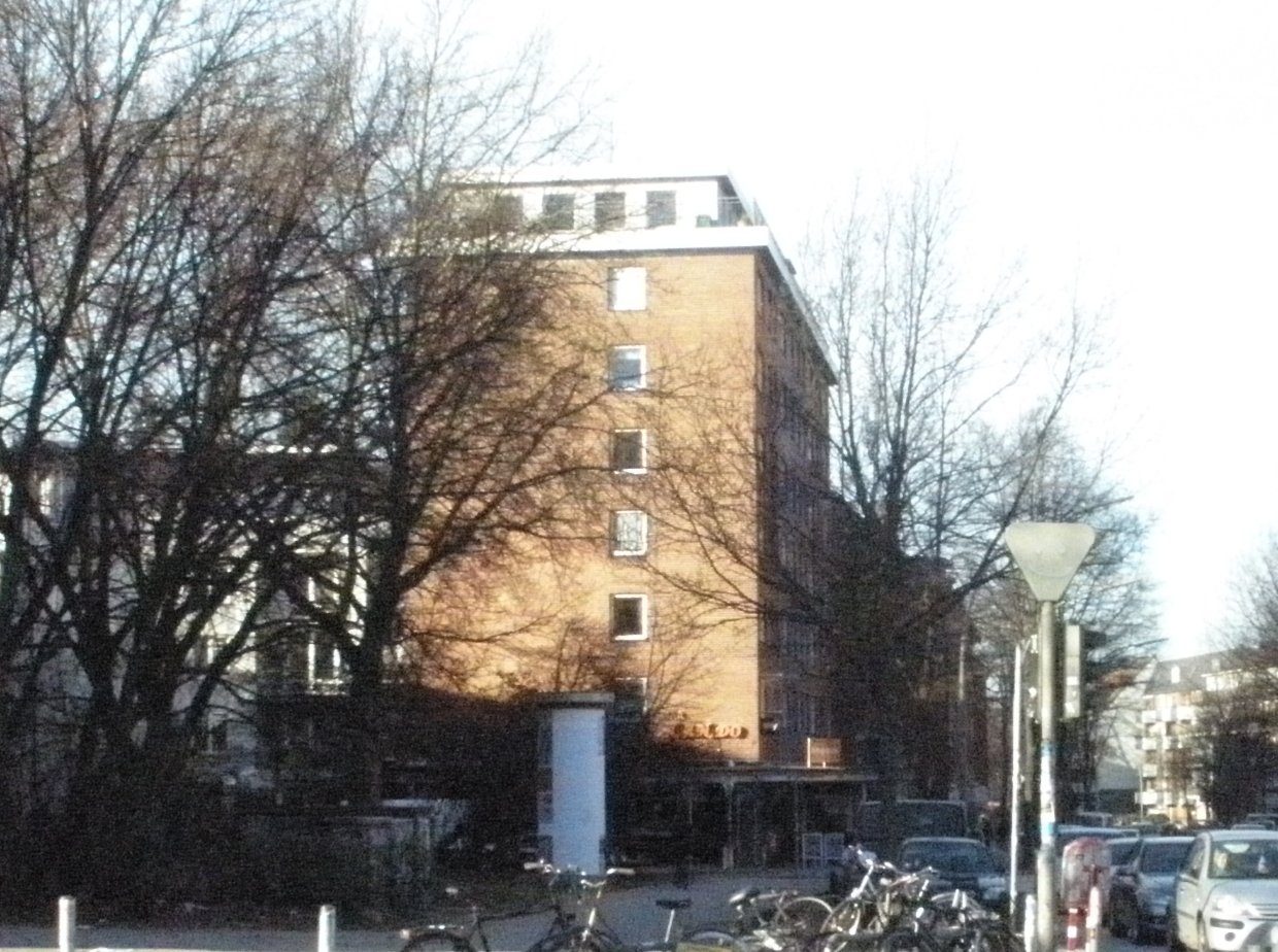 Schulterblatt Ecke Eimsbütteler Straße in Hamburg Eimsbüttel, ehemals Standort des Belle Alliance